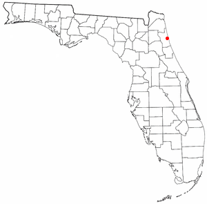 die Lage der Stadt St. Augustine in Florida